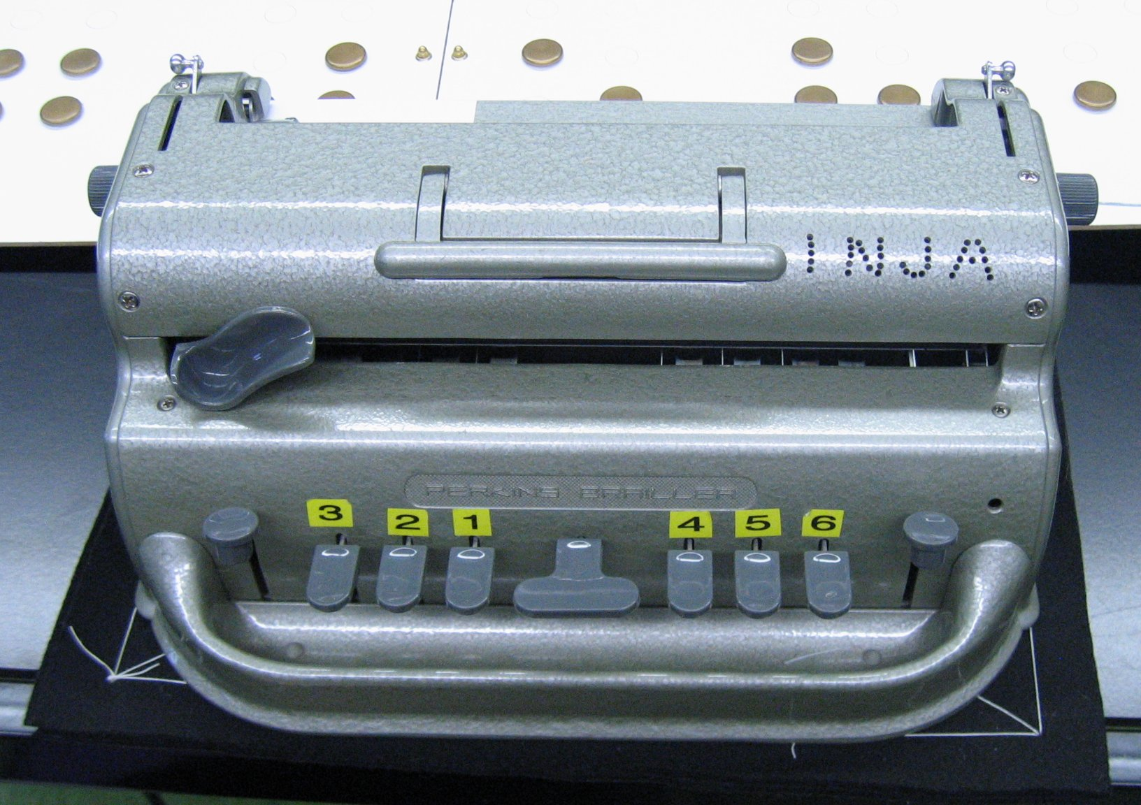 machine à écrire en braille